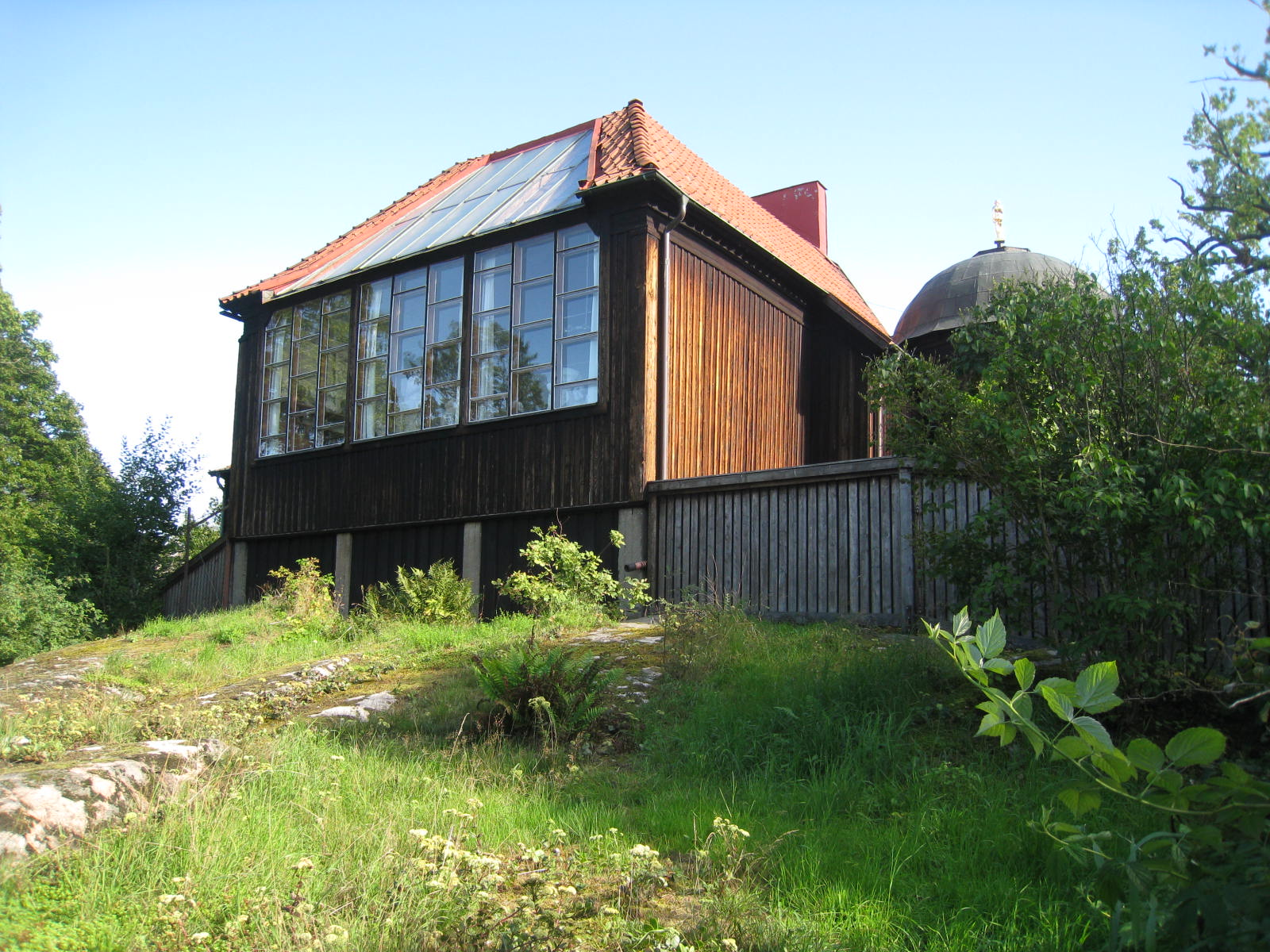 Carl Eldhs ateljémuseum, Bellevueparken, Stockholm, exteriör från norr, studioateljén. Arkitekt Ragnar Östberg. Ateljébyggnaden var klar 1919.